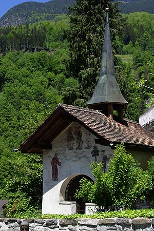 Tellskapelle in Bürglen (UR)